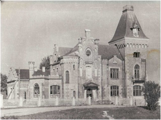 Беларуская (тарашкевіца): Расоны (Rasony), Станіславова (Stanisłavova), сядзіба Гласкаў (Hłaska)